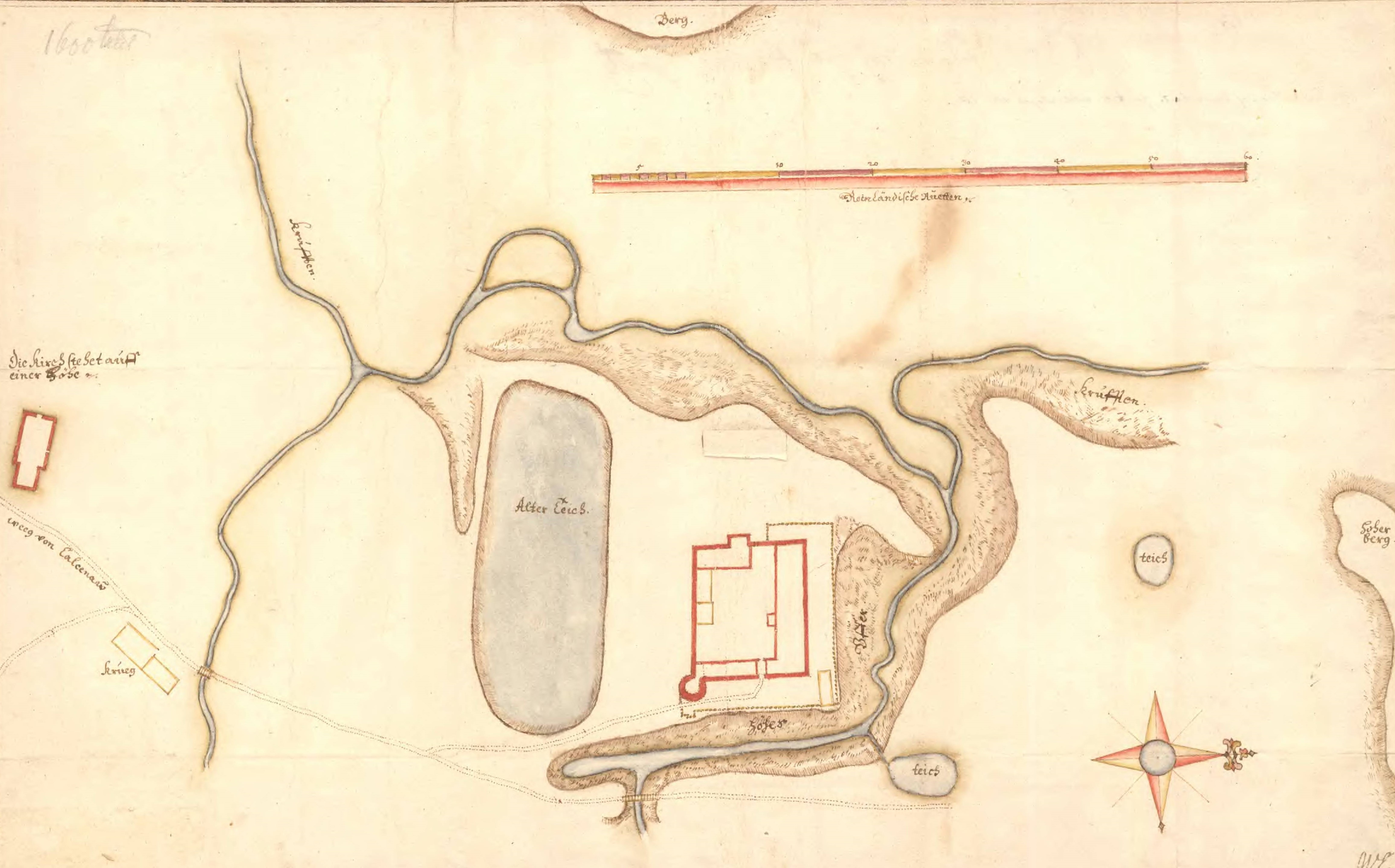 Linnuse ja lähiümbruskonna plaan XVII sajandist.